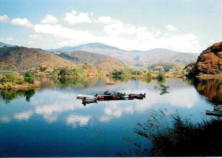 Lake